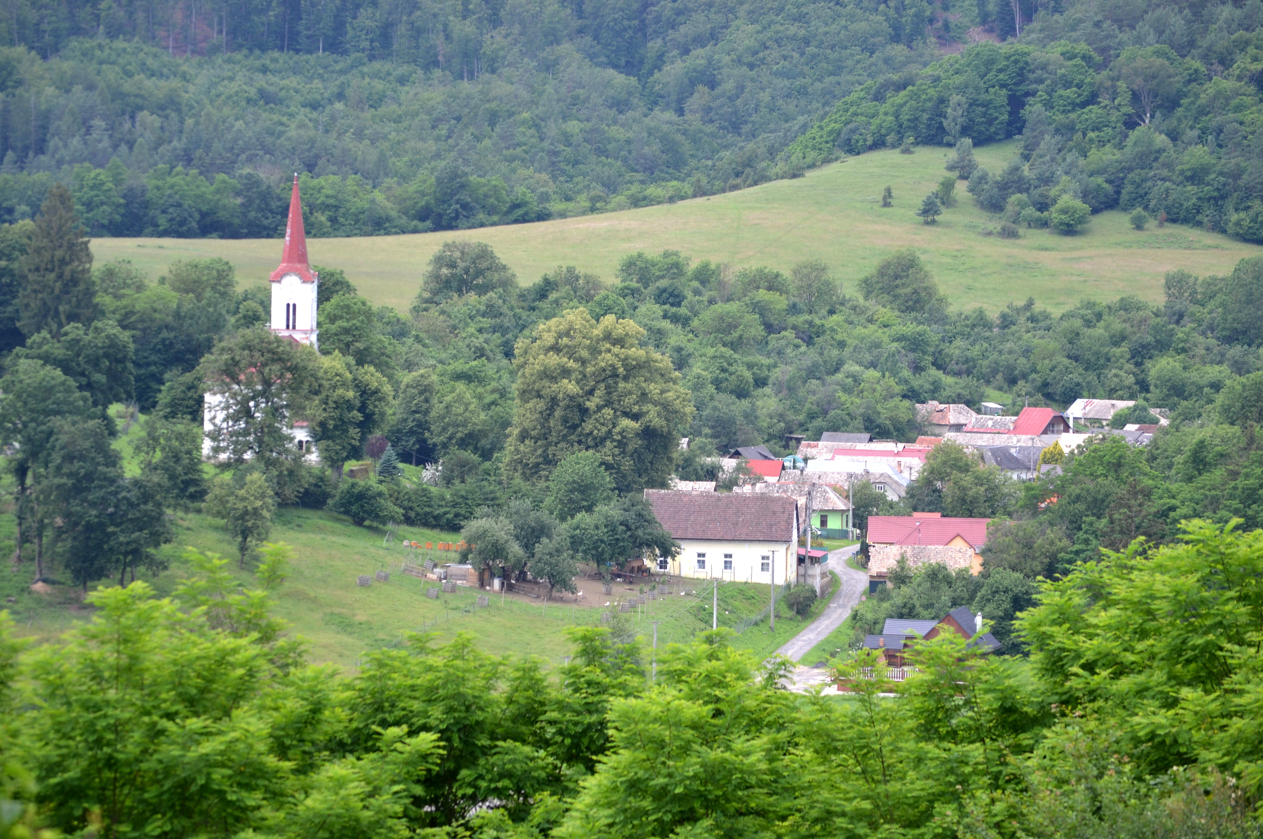 Pohľad na obec Ratkovská Lehota